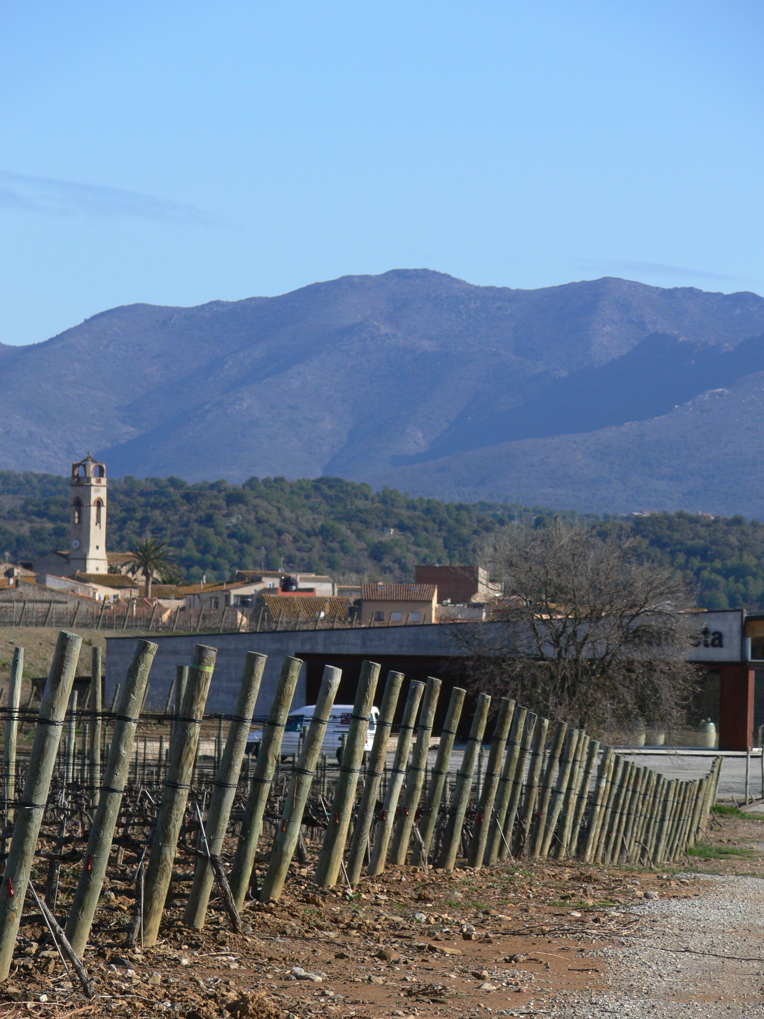 Les vinyes amb el celler, l'esglèsia de Mollet i l'Albera al fons. Magnífic